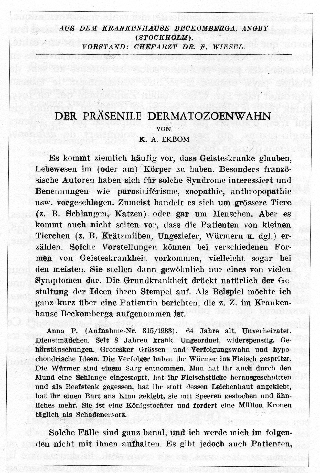 copie page article